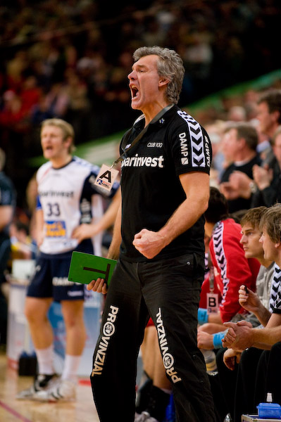 Per Carlen als Trainer der SG Flensburg-Handewitt